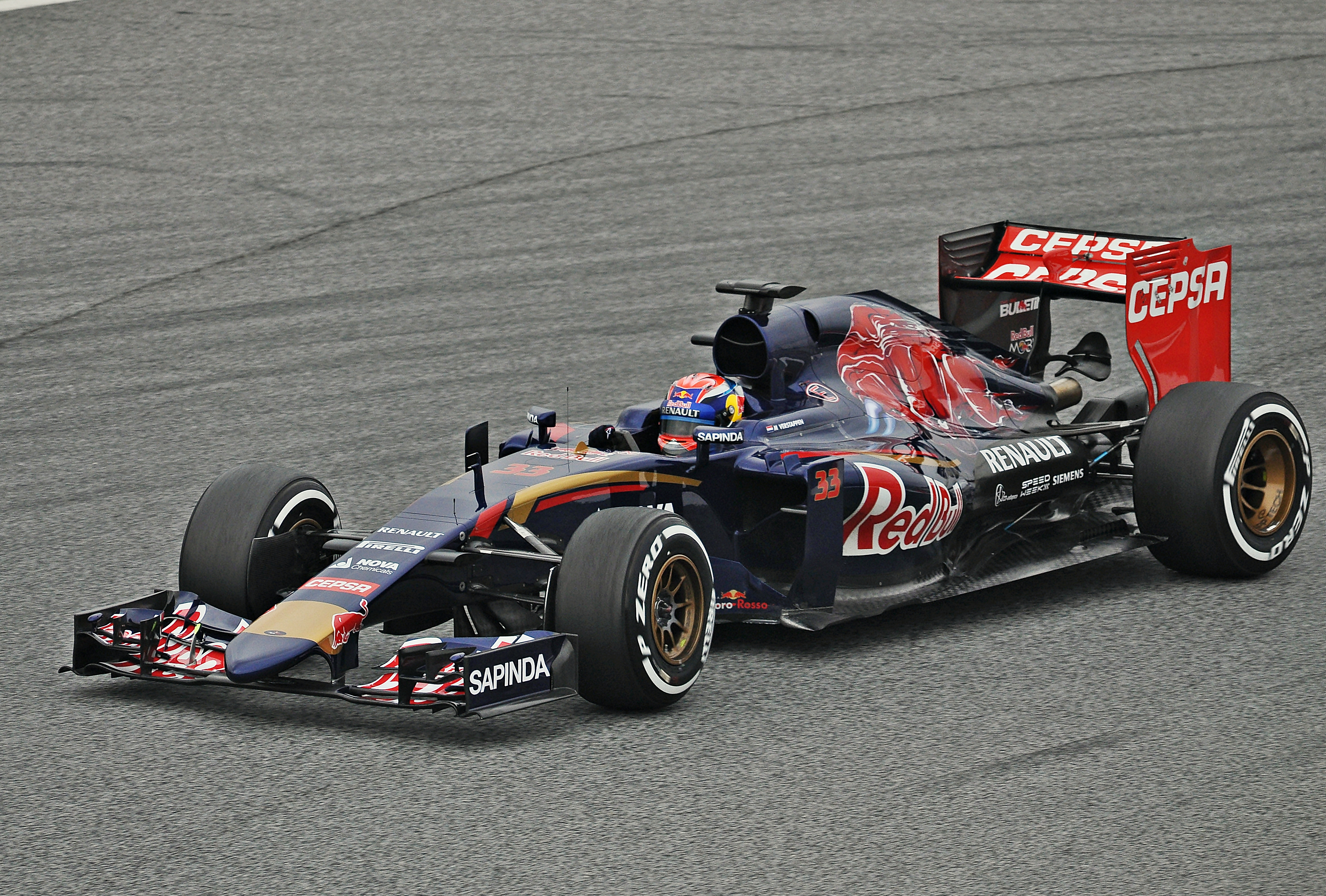 Test days Barceloan 2015